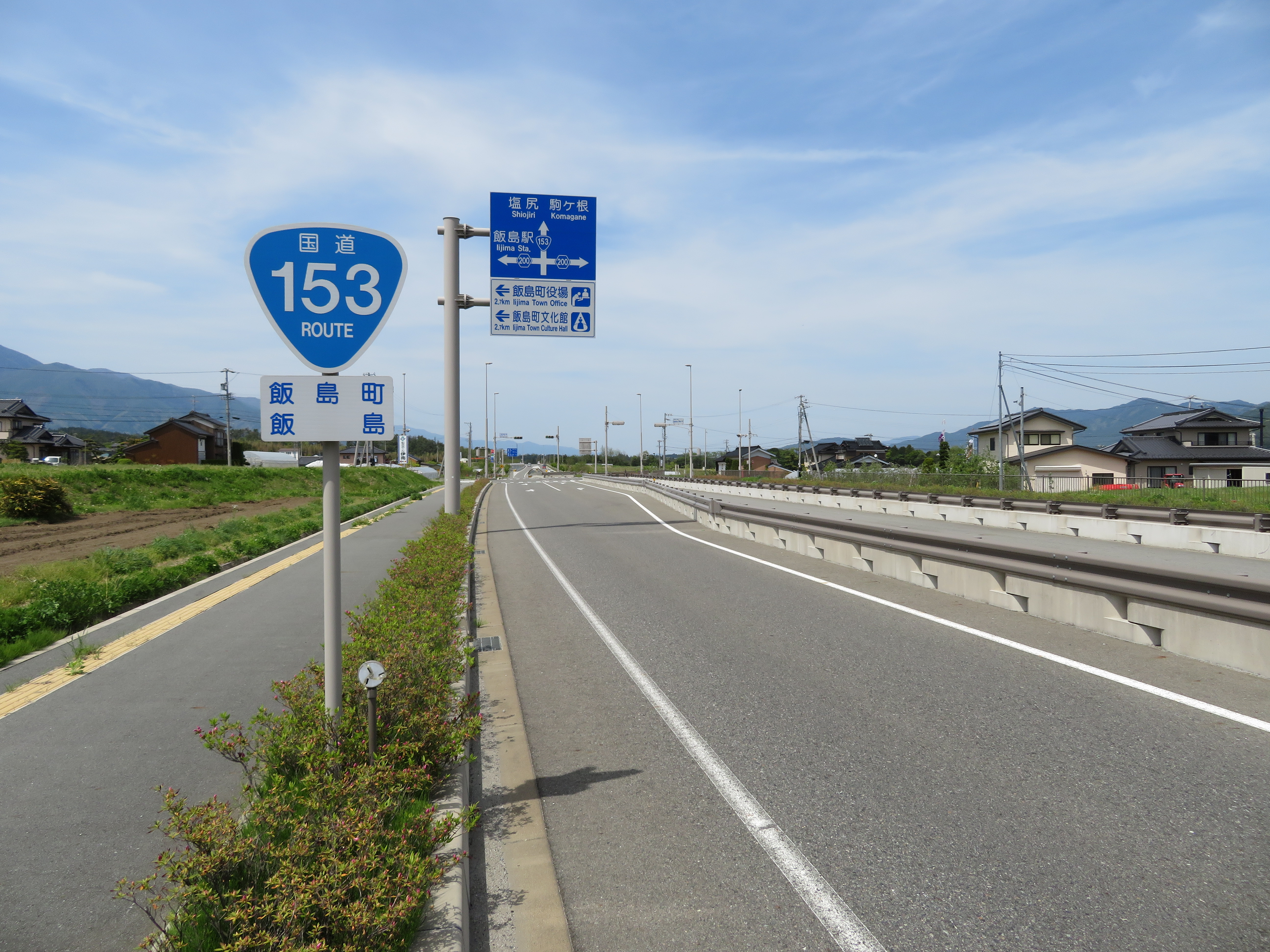 国道153号線 伊南バイパス 長野県上伊那郡飯島町飯島付近（塩尻方面を撮影） Canon PowerShot SX720 HS